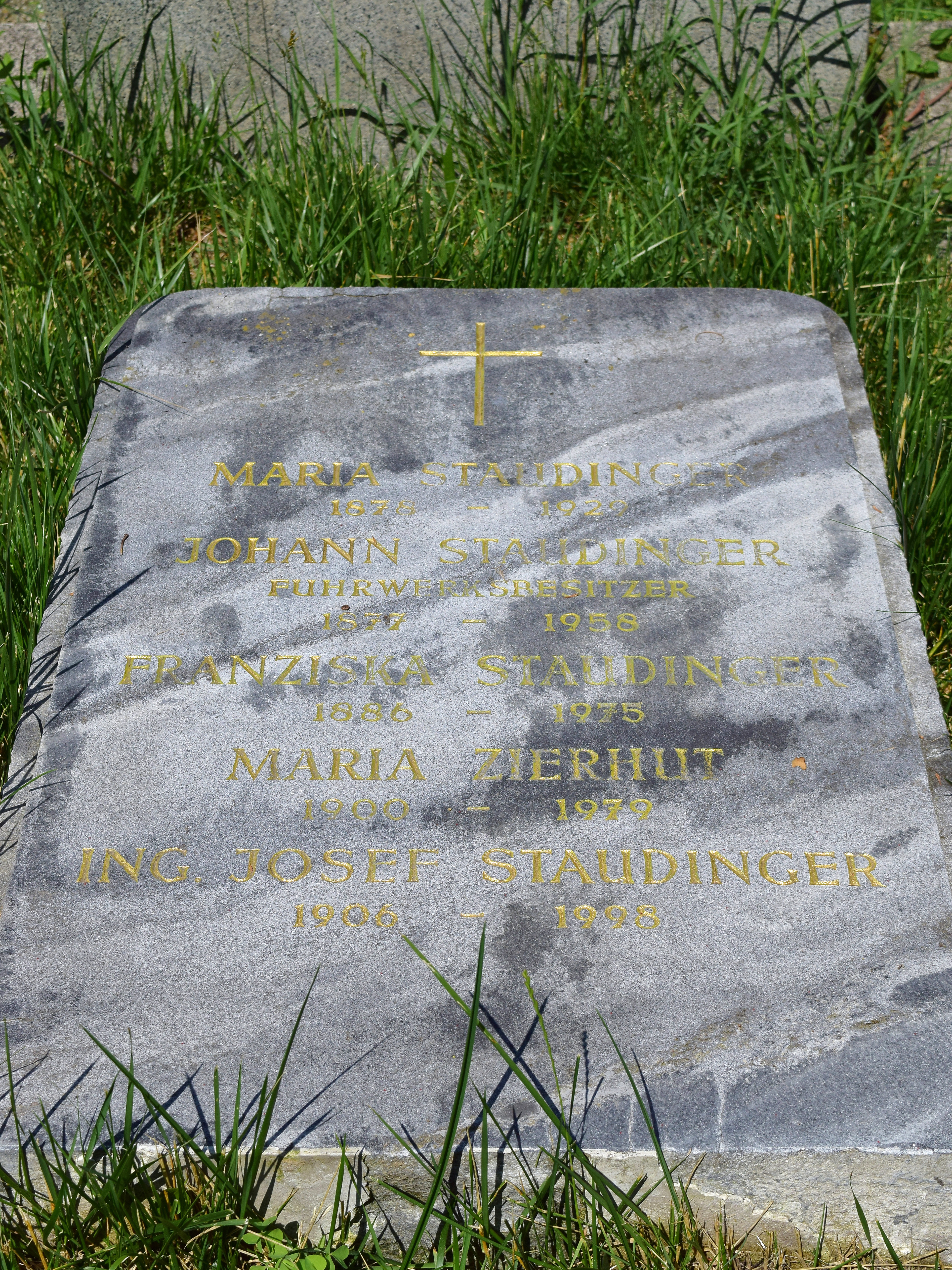 Auf dem Hernalser Friedhof befindliches Grab der Familie Staudinger, in dem auch die Wasserspringerin Alma Staudinger begraben liegt (Gruppe B, Nummer 84).